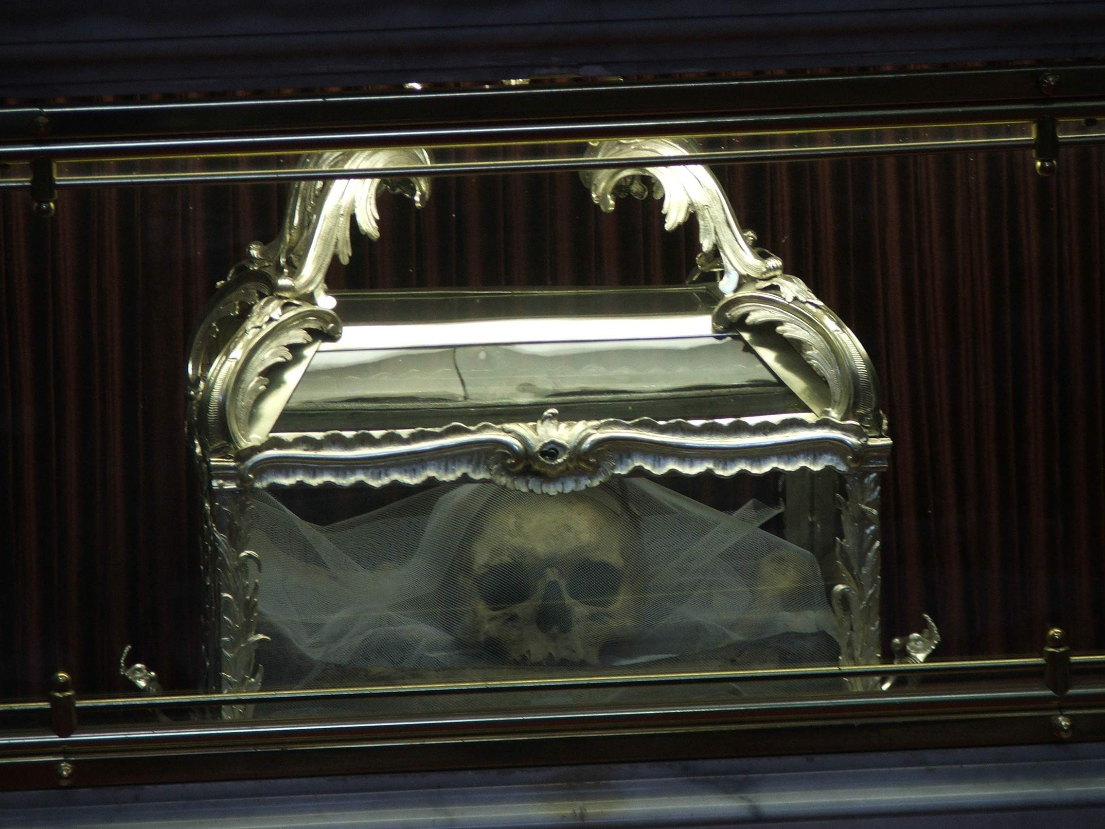 Szent Kőrösi Márk csontereklyéi az esztergomi főszékesegyházban, az ereklyetartó eredetileg a Szent Jobb egykori ereklyetartója volt